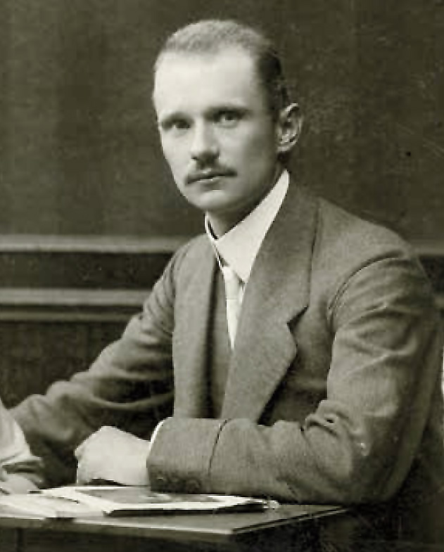 Rudolf Günther (Architekt), Foto um 1911 (Ausschnitt).